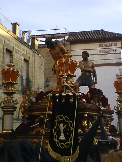 Cristo de la Columna de Úbeda, procesionando en Plaza de Andalucía el Jueves Santo de 2009.